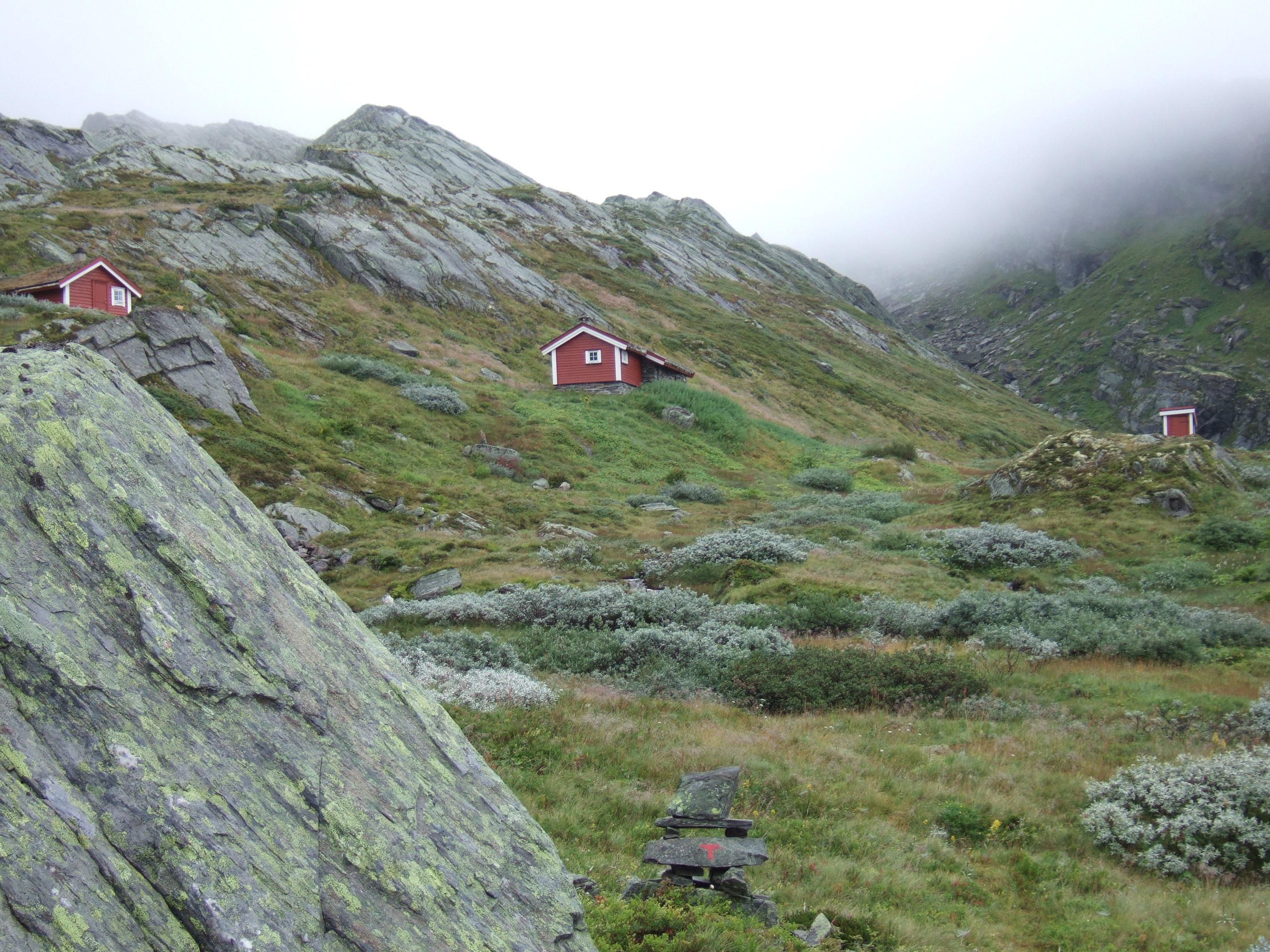 Stølsdalen